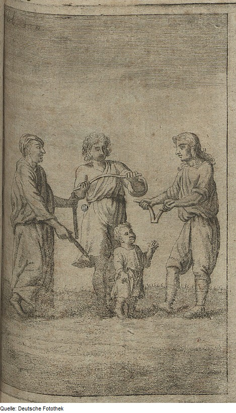 Original image description from the Deutsche Fotothek Radiästhesie & Wünschelrute